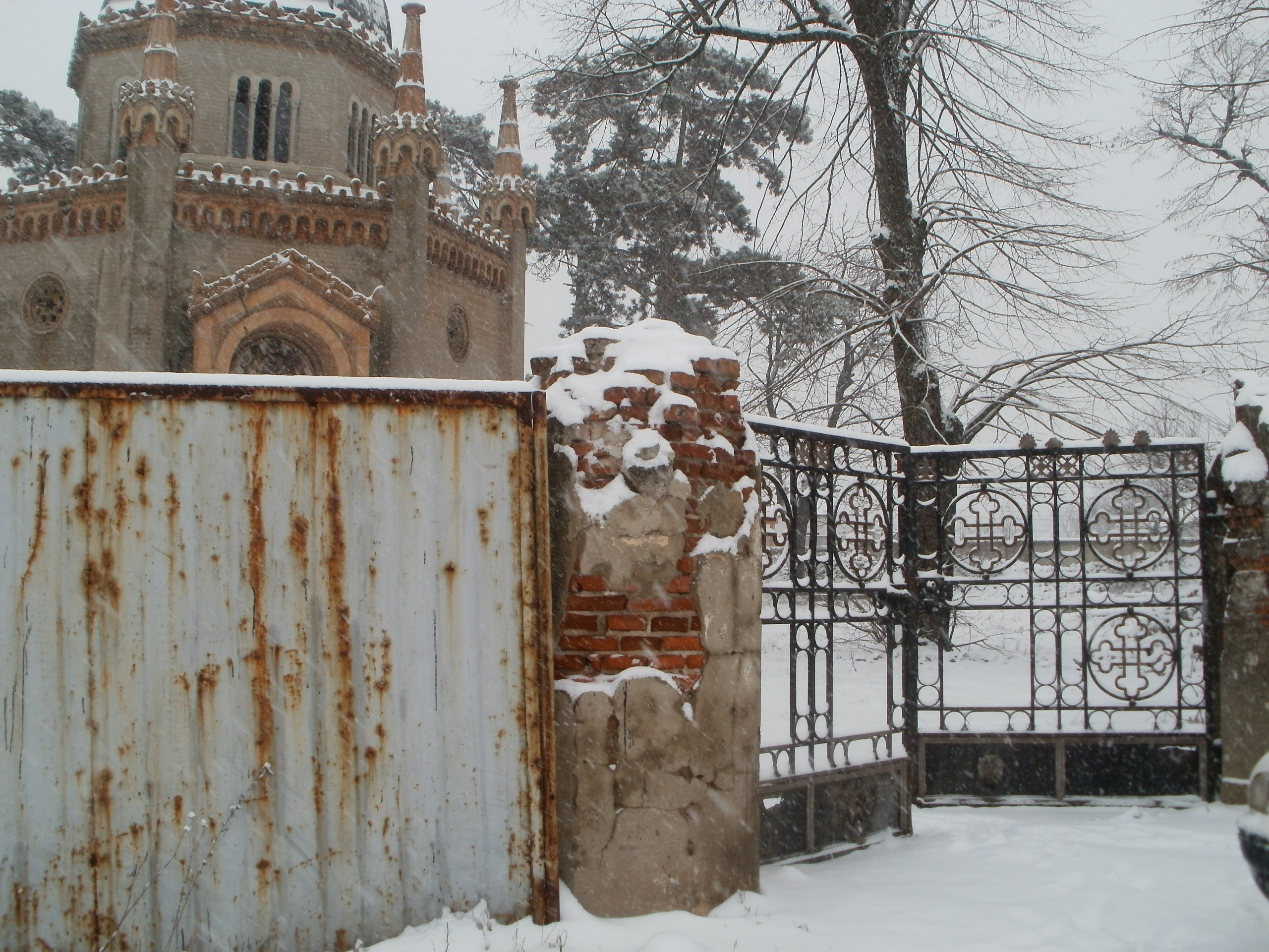 Zid incintă cu poartă 03